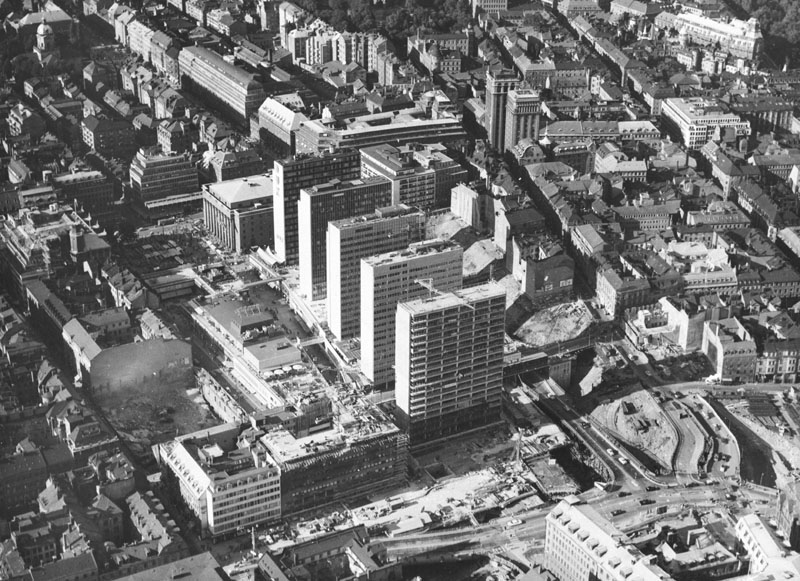 Flygbild över Hötorgscity mot norr, i förgrunden det blivande Sergels torg